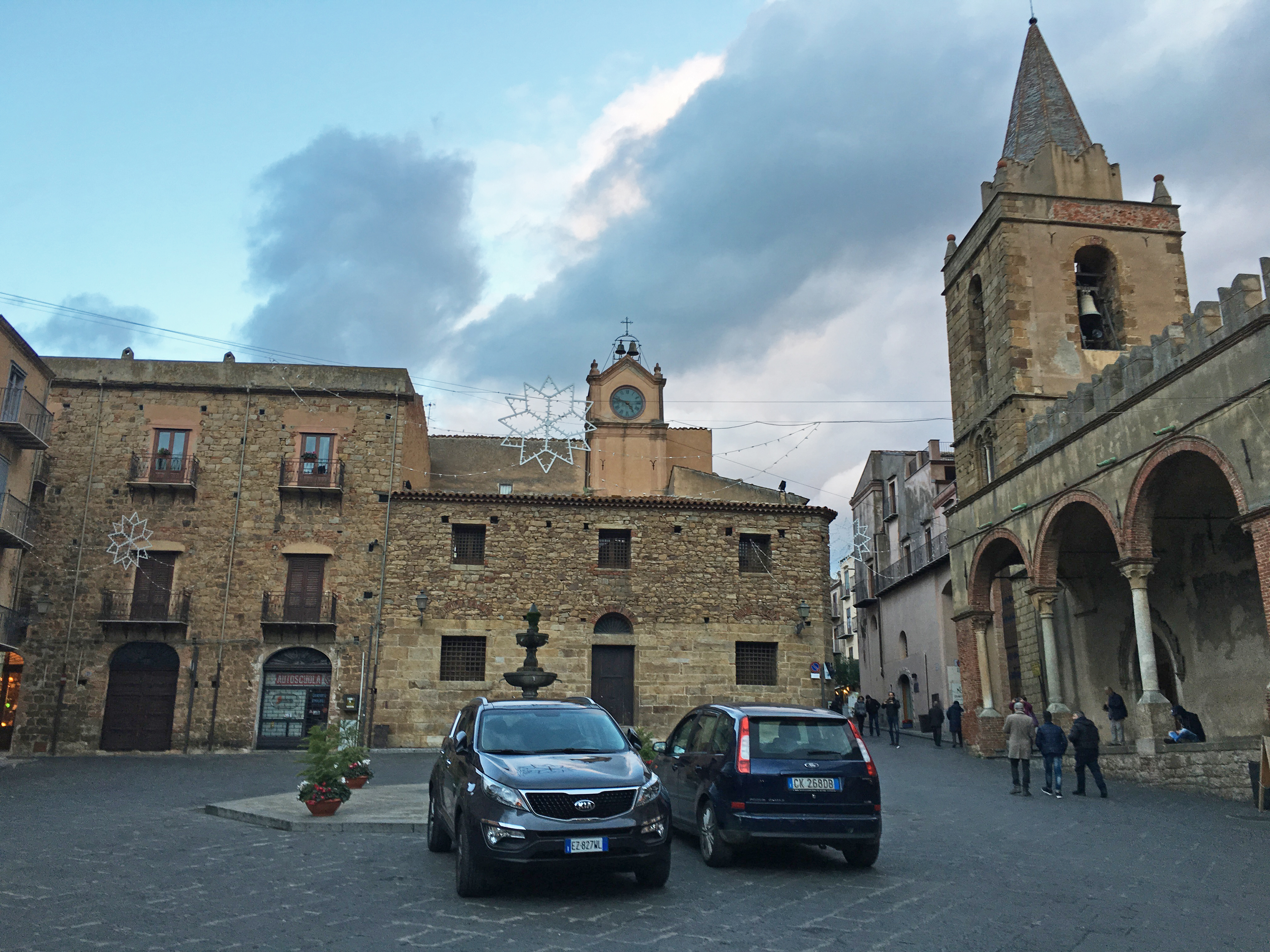 Piazza Margherita, a Castelbuono. Sulla destra la matrice vecchia